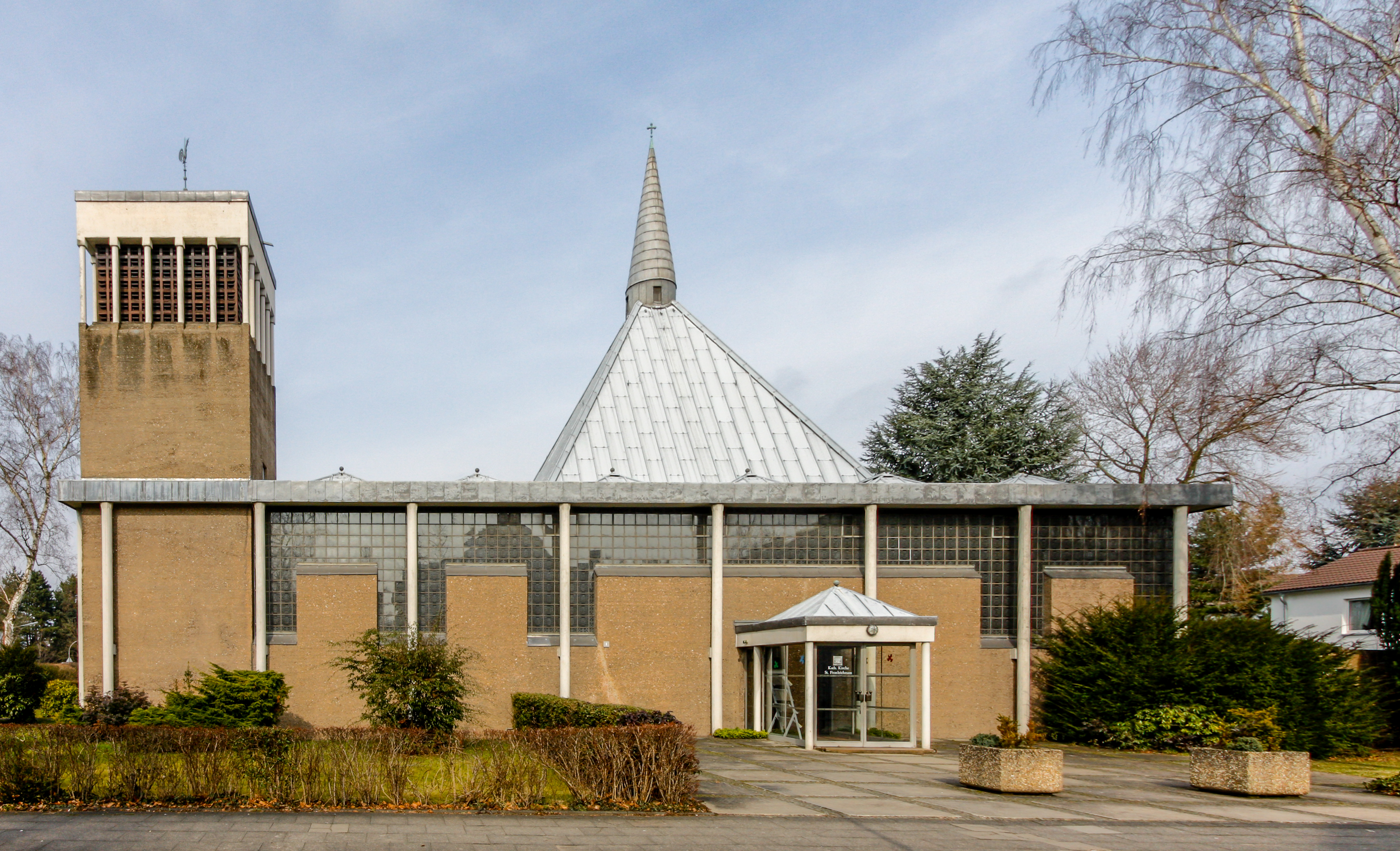 Kirche St. Fronleichnam in Köln-Porz-Urbach. Architekt: Gottfried Böhm